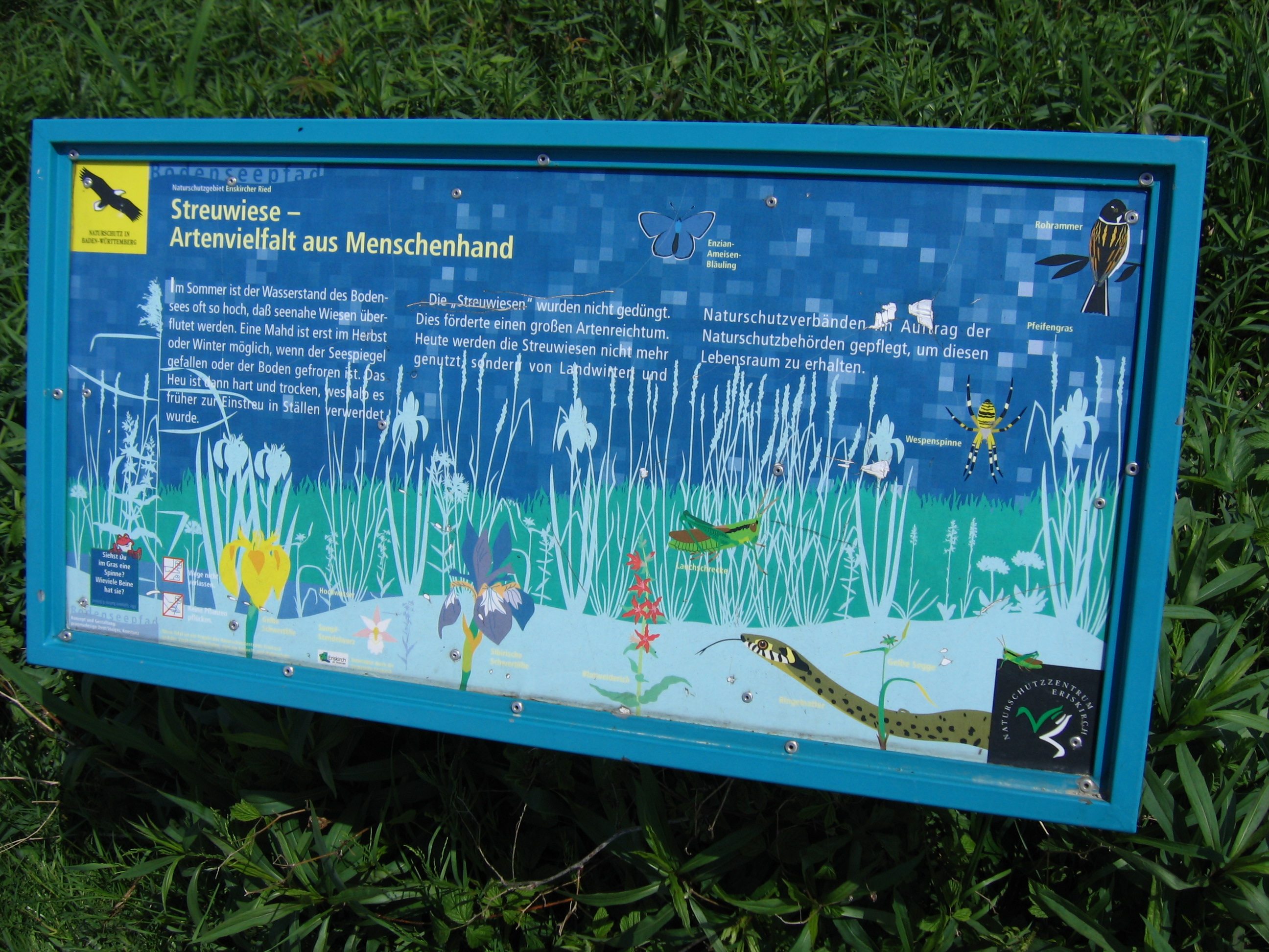 Bodenseepfad/Eriskircher Ried: Infotafel Streuwiese